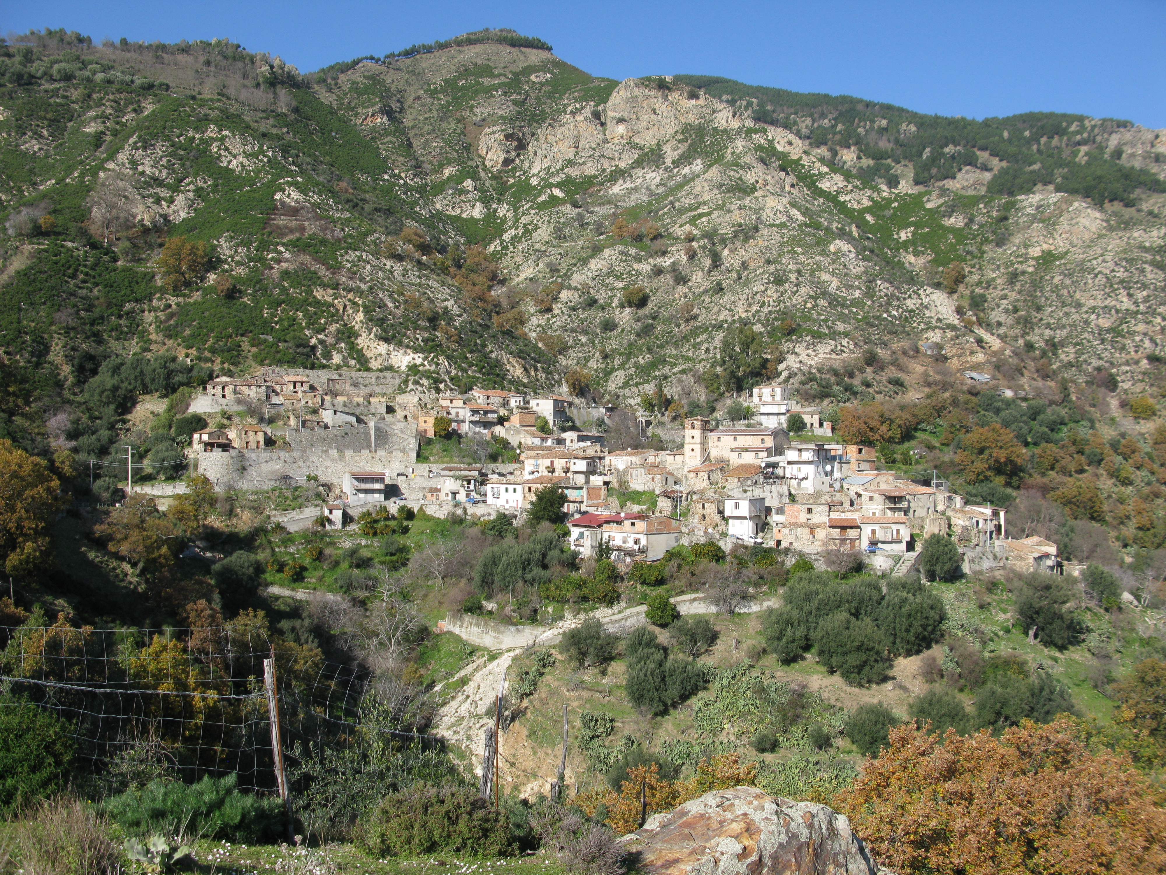 Gallicianò